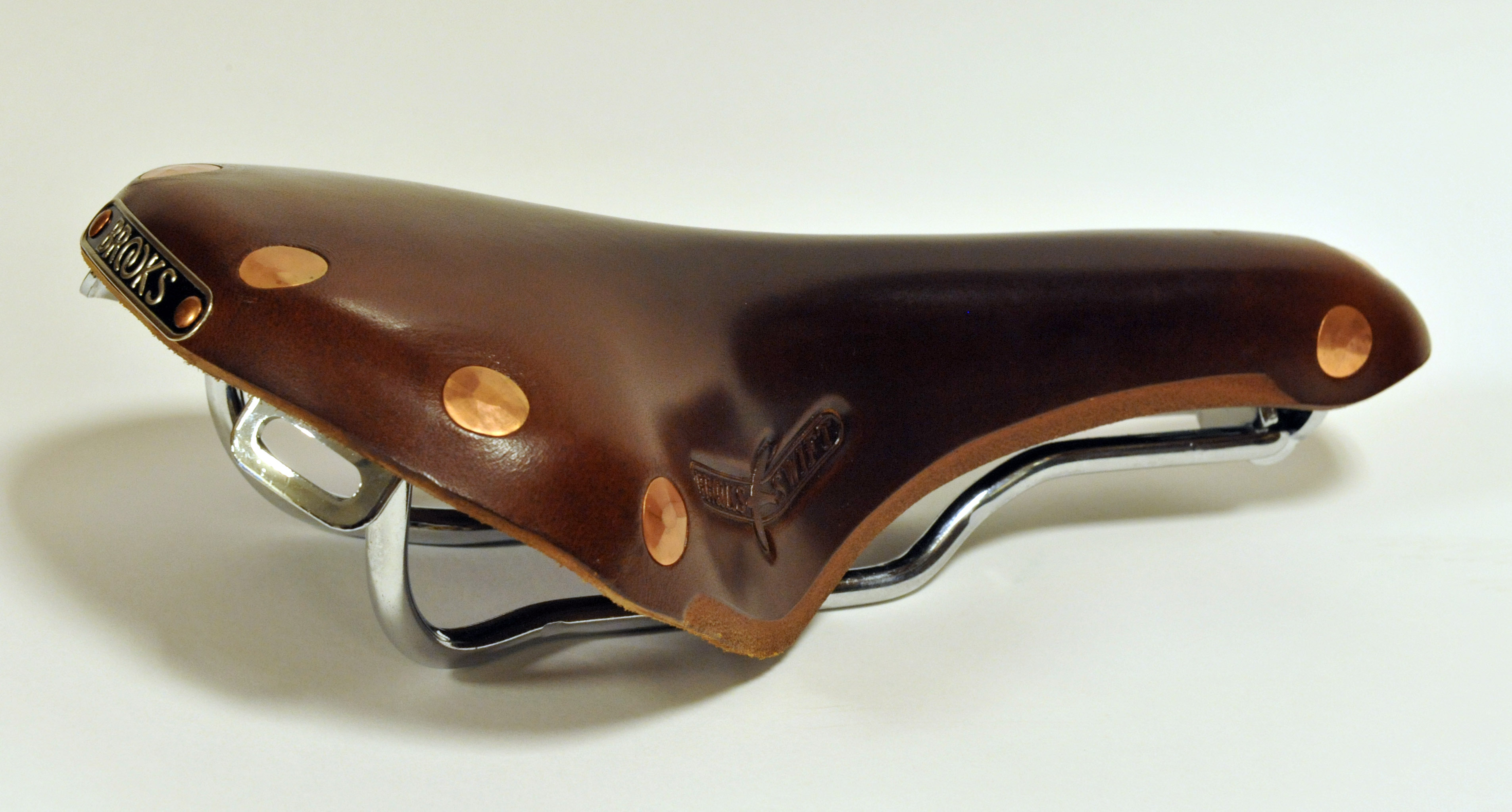 Brooks saddle Swift